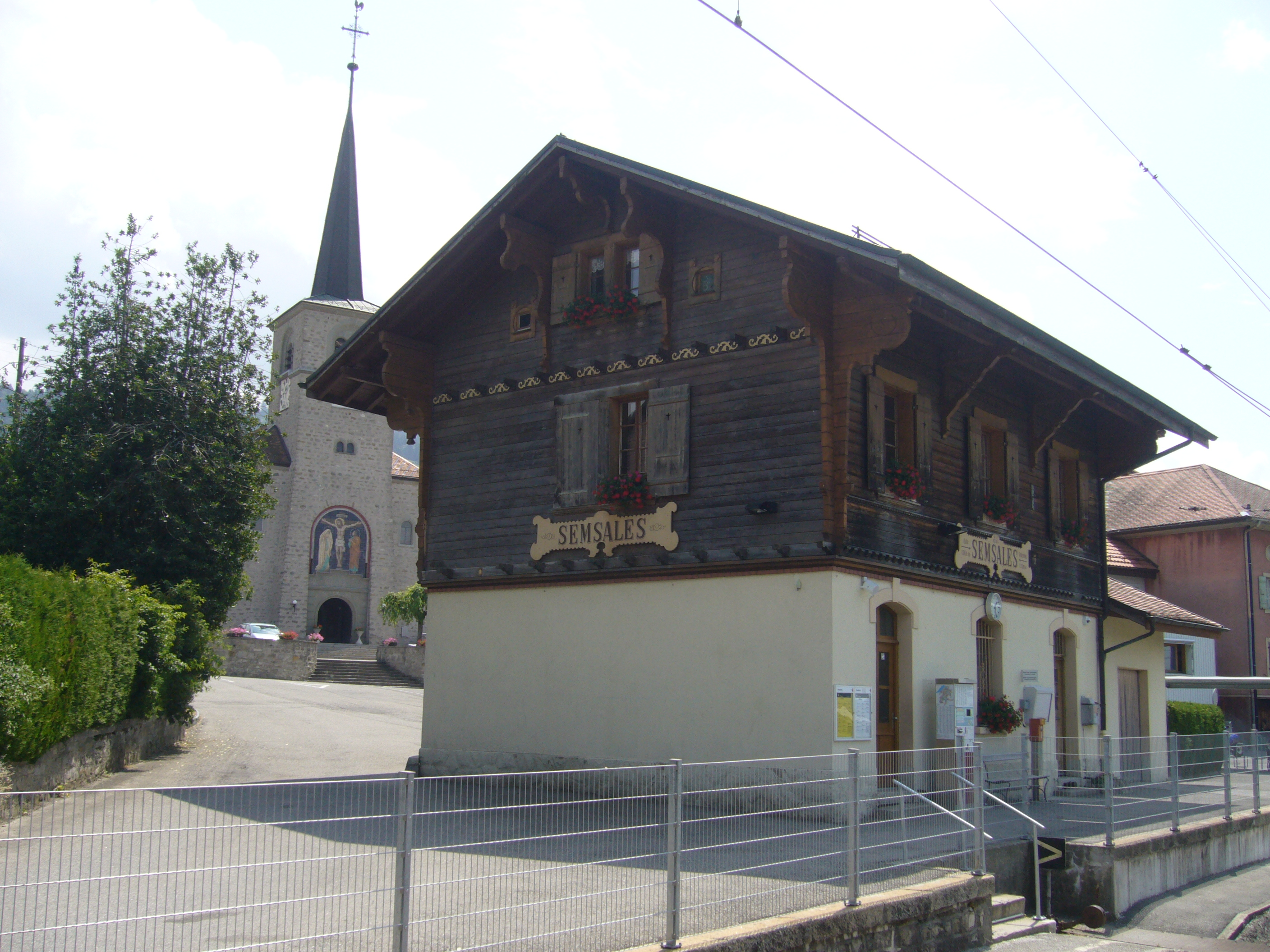 Bahnhofgebäud von Semſales, aus dem Zuge aufgnommen; links im Hindergrunde der Turm der 1925 vollendeten neuen Nikolaus-Kirch mit Darſtellung Iesu am Kreuze.